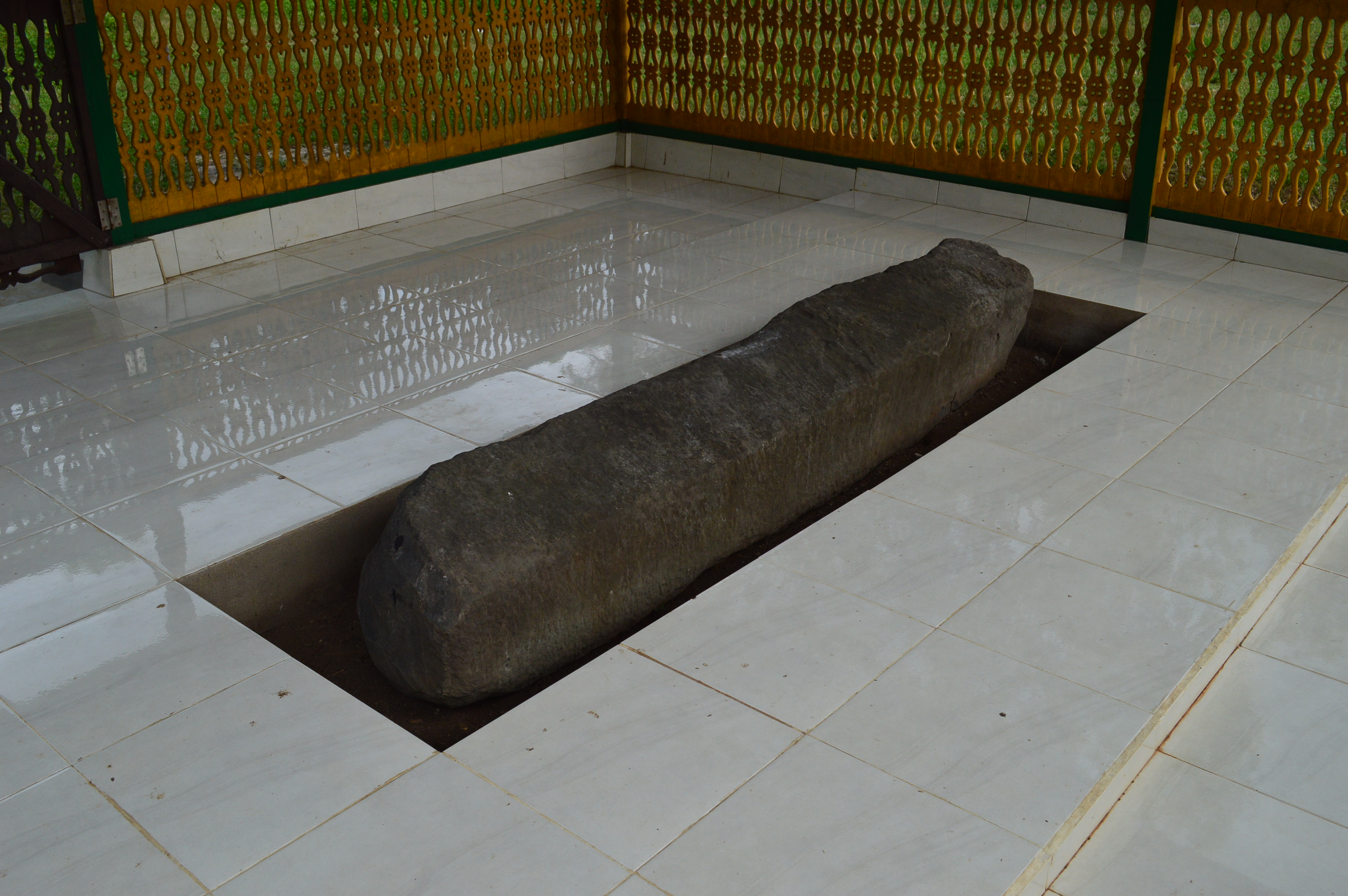 Lesong Batu, peninggalan Kerajaan Kutai yang masih tersissa di bekas kerajaannya.